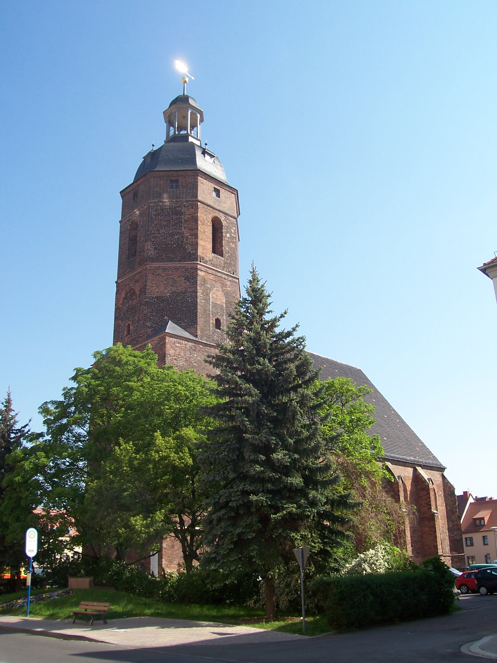 Stadtkirche St. Nikolai in Eilenburg